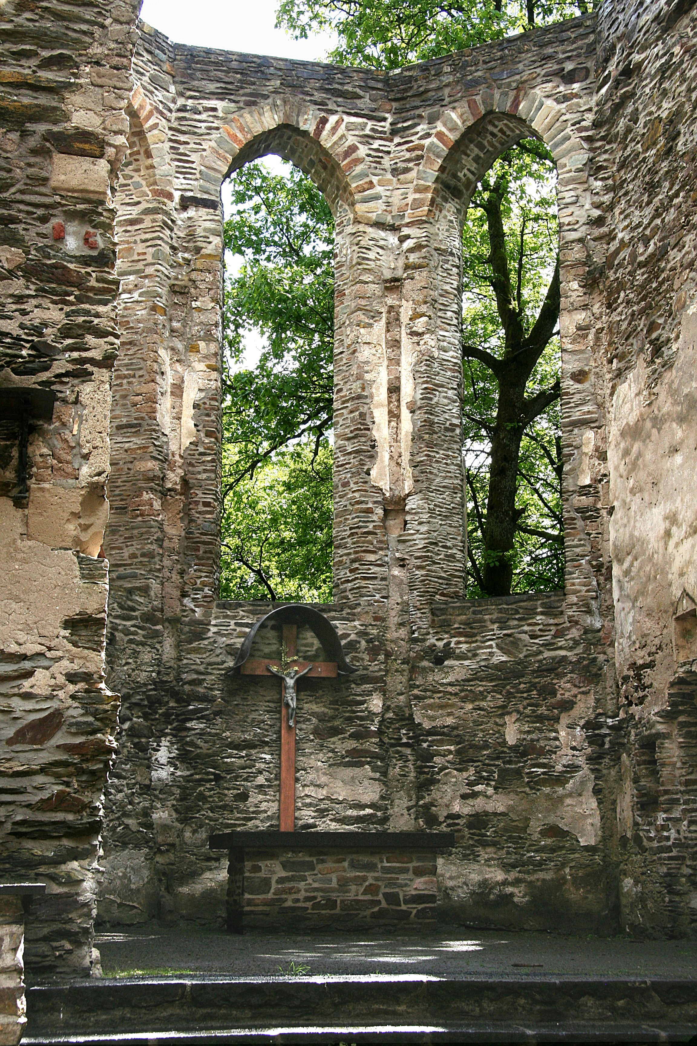 Kirchenruine Hausenborn bei Isenburg im Westerwald, erbaut um 1440, im 19. Jahrhundert zerfallen, in neuerer Zeit wieder Wallfahrtsort